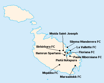 Répartition des clubs de Premier League Maltaise 2007-2008.